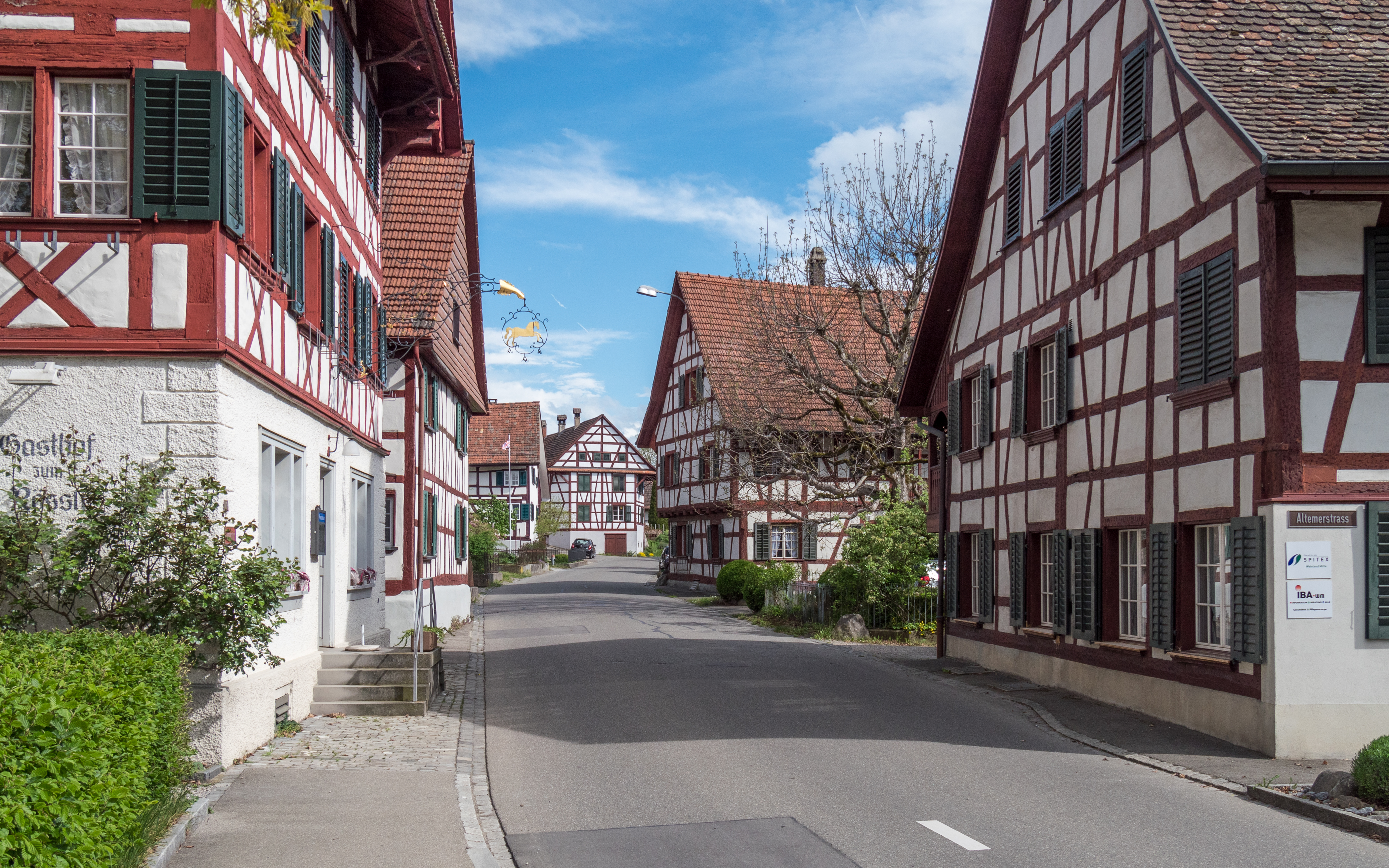 Fachwerk im Zürcher Weinland: Strasse "Oberdorf" in der Gemeinde Marthalen.